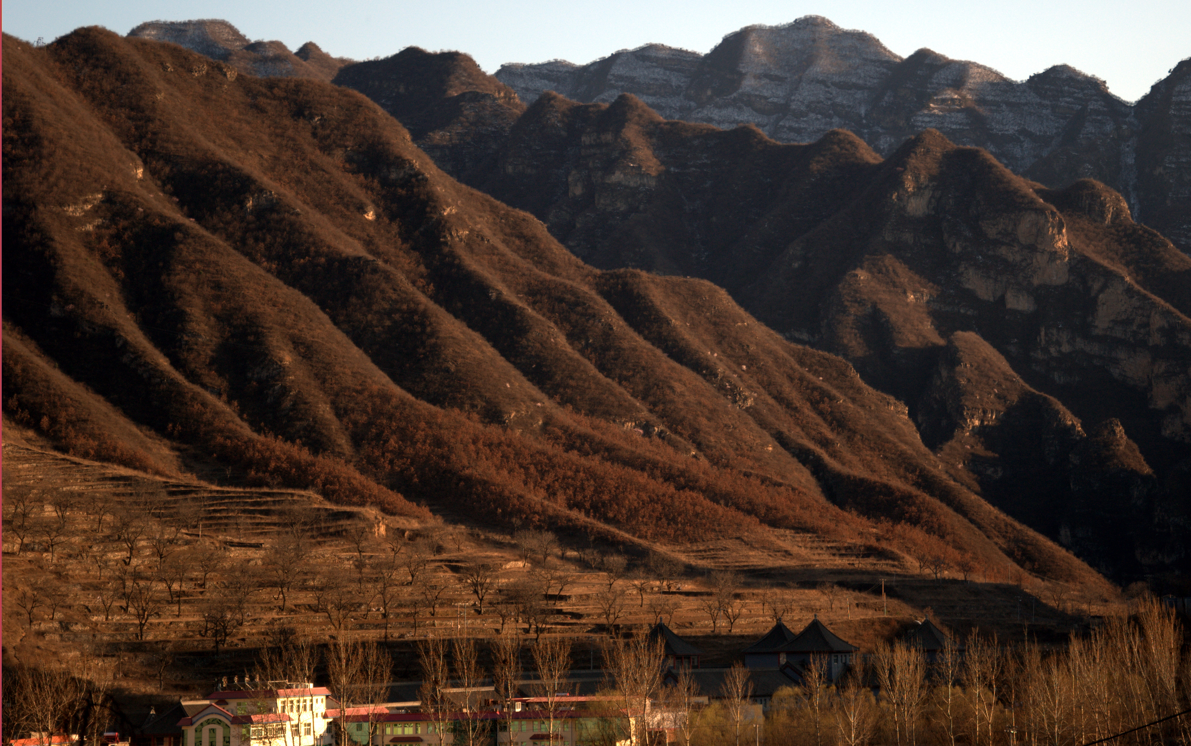 河北百里峡 黄昏时分